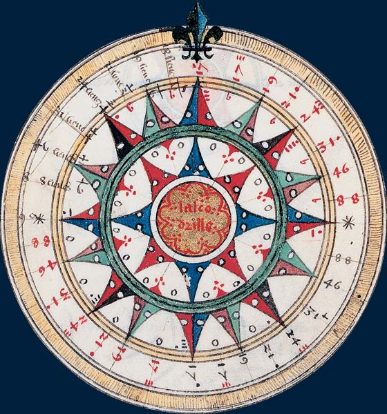 Cadran des marées. Guillaume Brouscon, Manuel de pilotage à l'usage des pilotes bretons, 1548. Parchemin (17,5 x 14 cm). BNF, Manuscrits, français 25374, f. 14 v°.